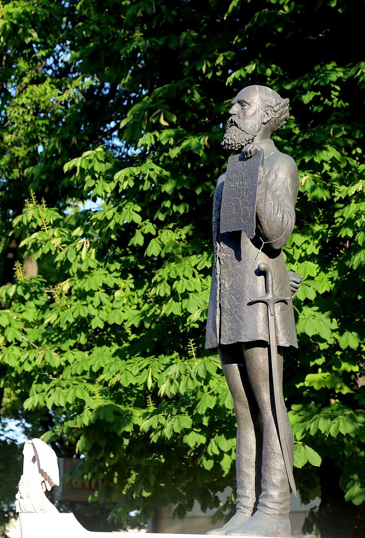 Batthyány Lajos szobra Budán a róla elnevetett téren